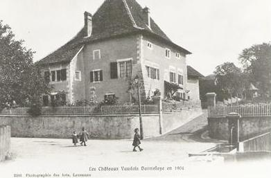 Photo datant de 1904 du château de Donneloye (Suisse/Vaud) Photo provenant du Site officiel de la commune de Donneloye